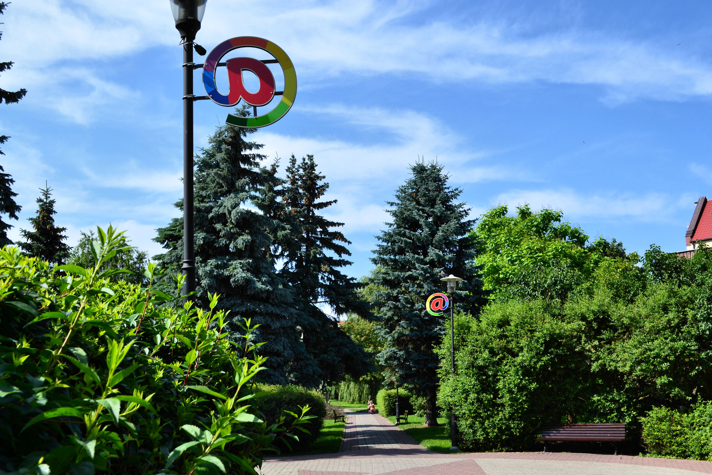 Oznaczenie miejsca dostępowego do internetu w kołobrzeskim parku